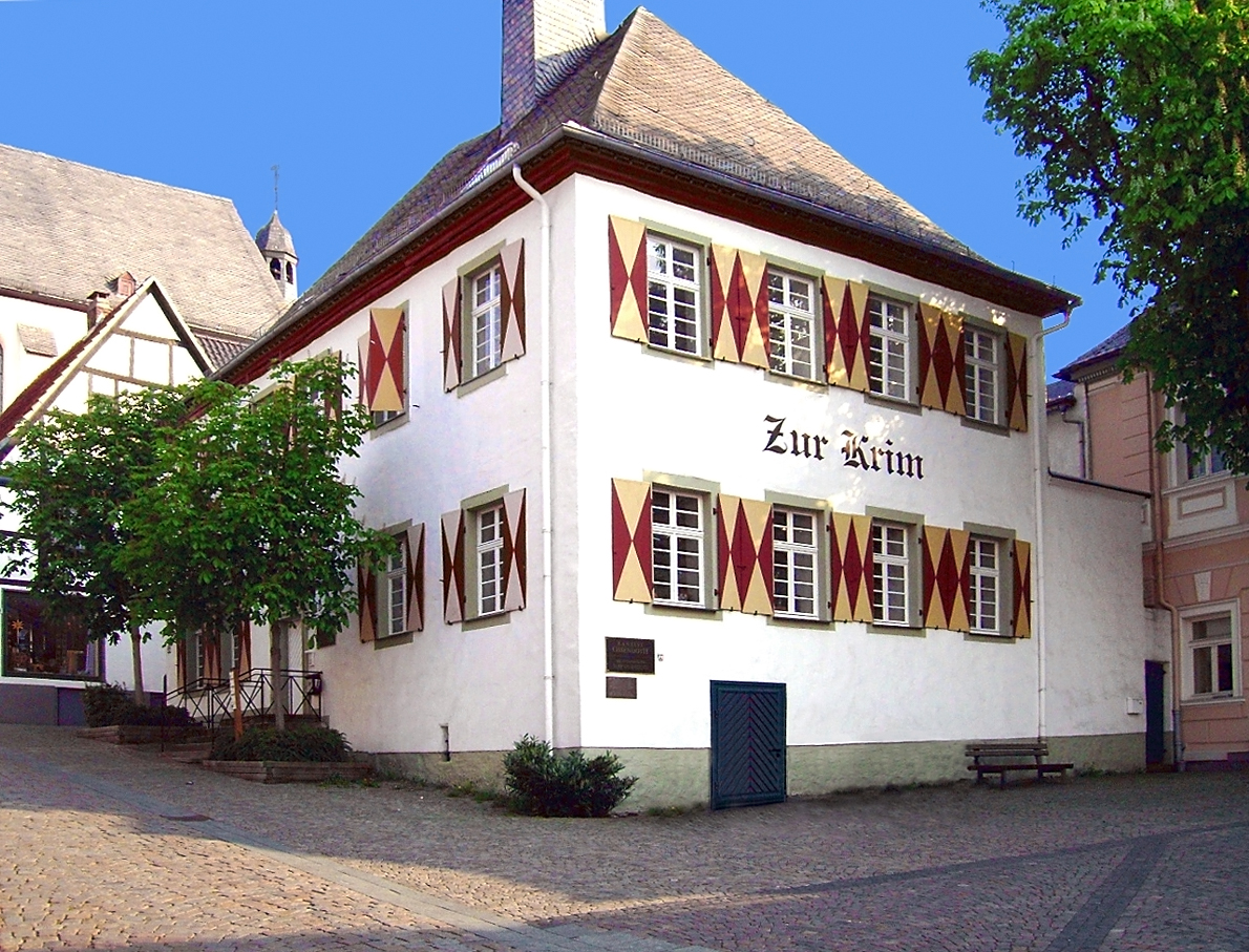 Haus zur Krim, Arnsberg